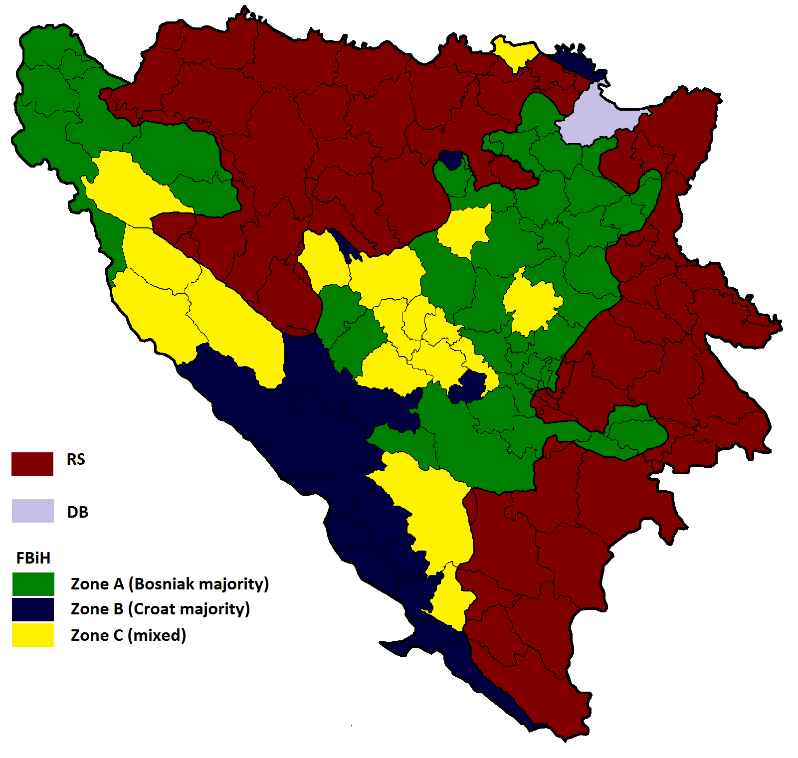 HDZ BiH proposal for electional division of fBiH